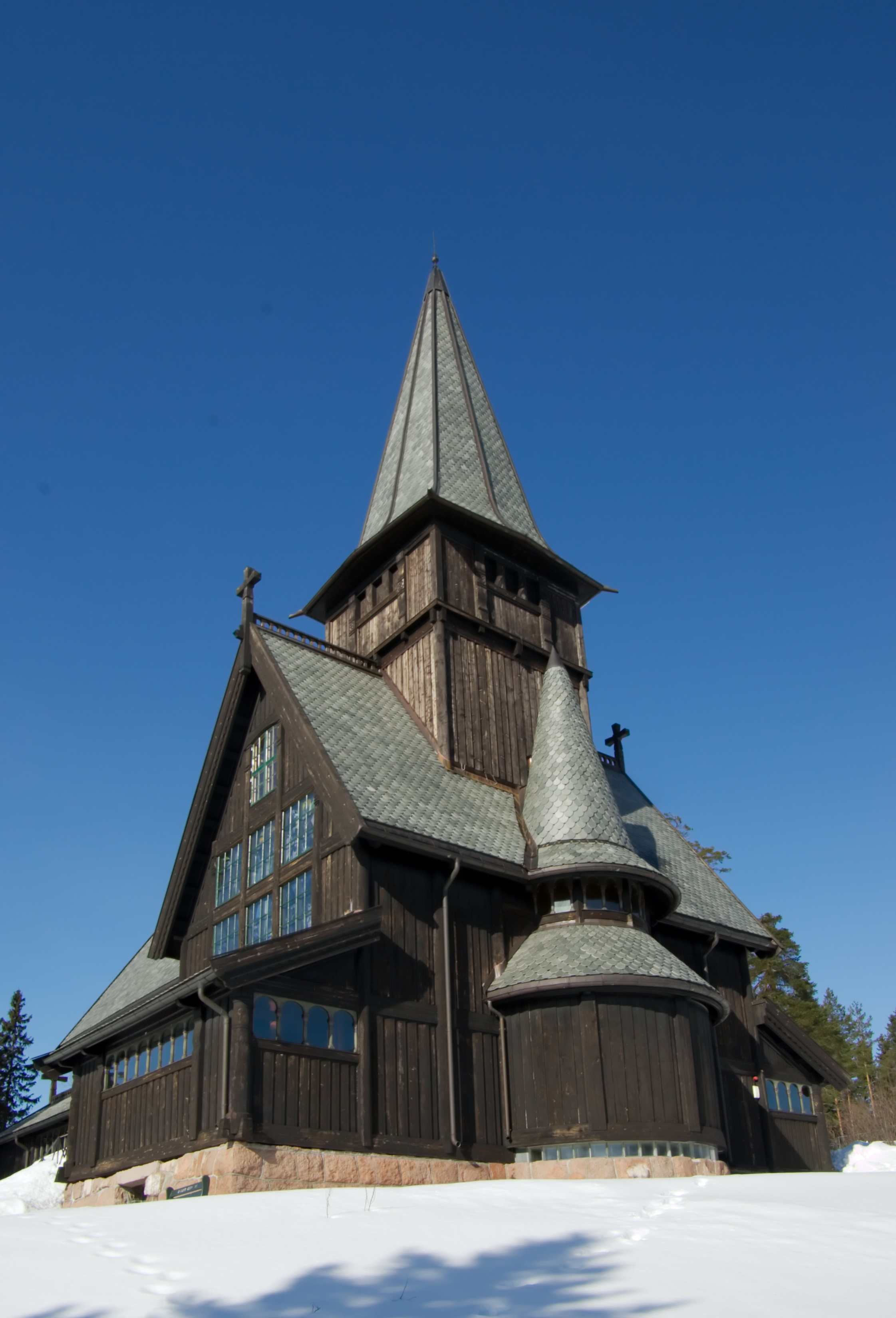 Holmenkollen kapell, front